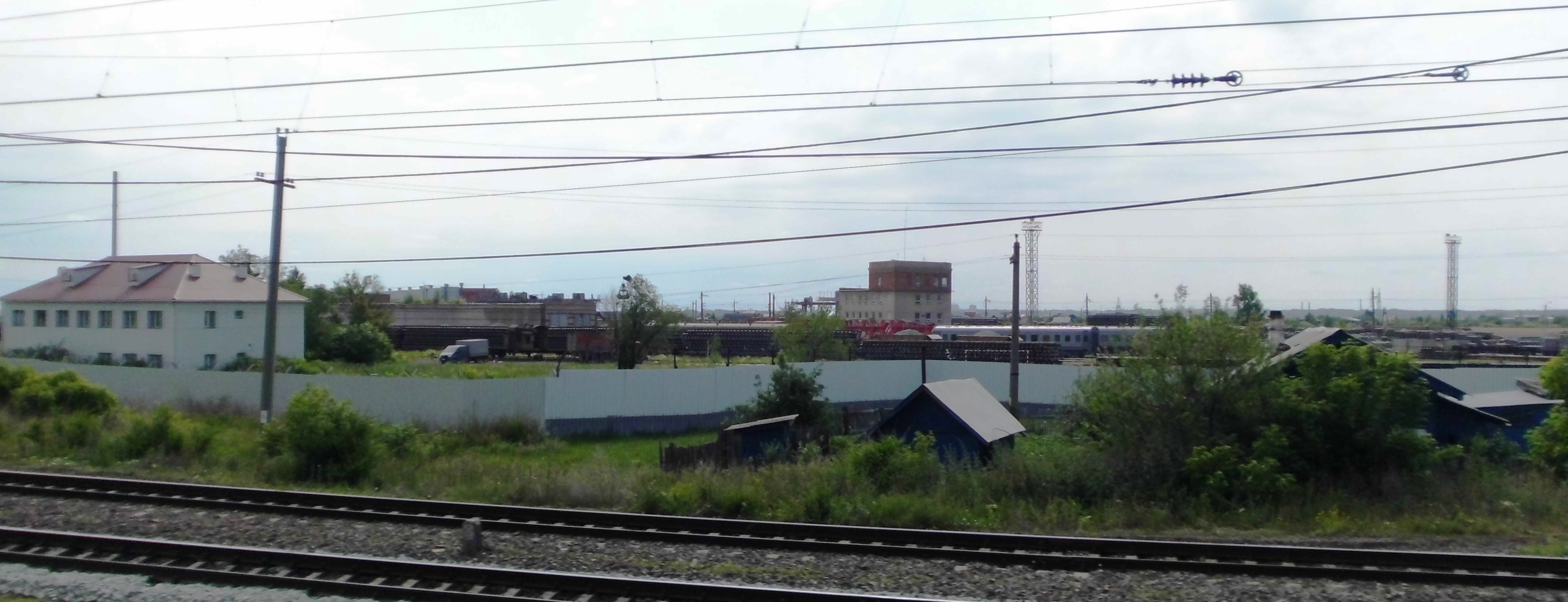 Россия, г.Челябинск, база ПМС-42.